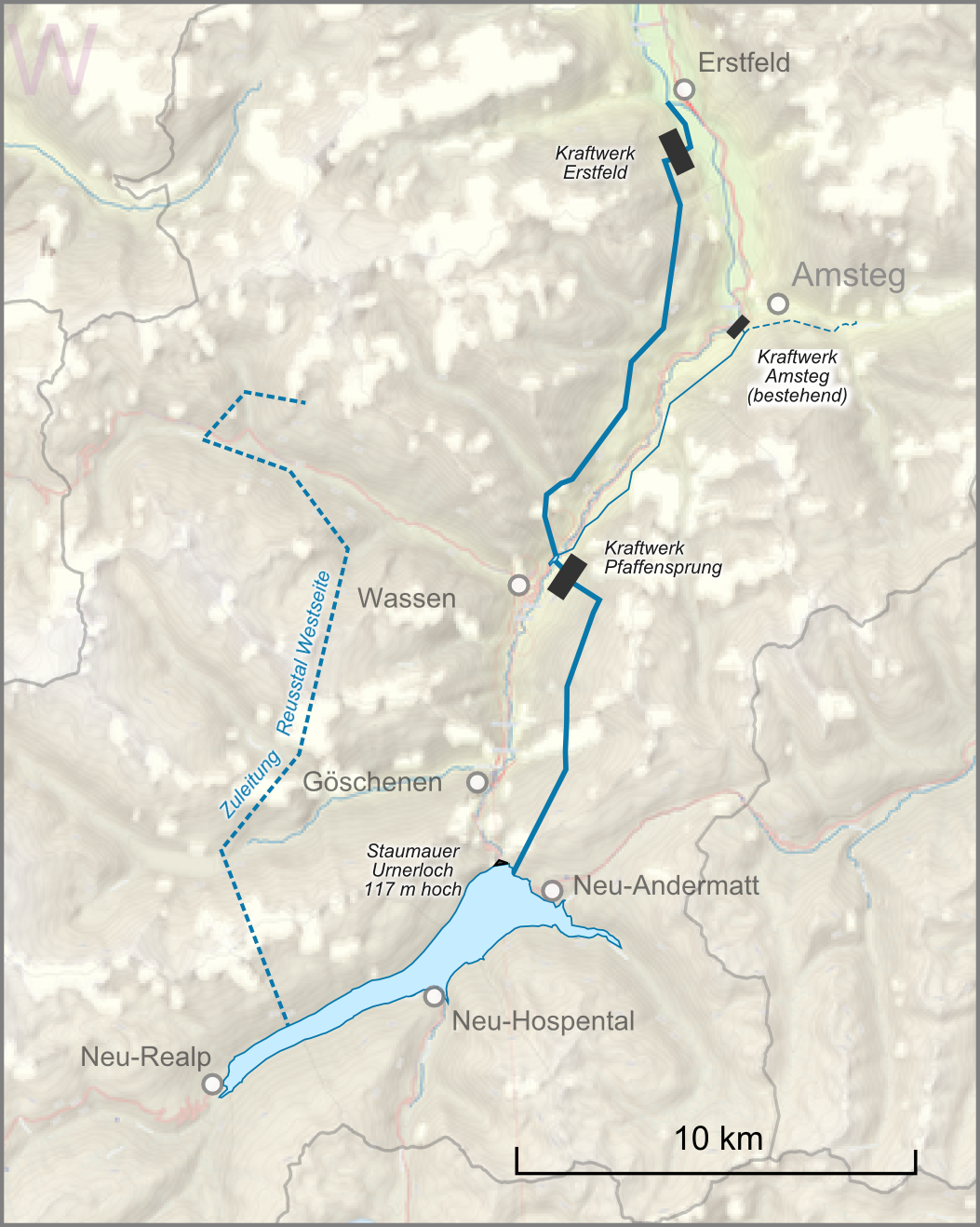 Lagekarte des Vorprojektes des Eidgenössische Amt für Wasserwirtschaft für ein Urserenkraftwerkes.